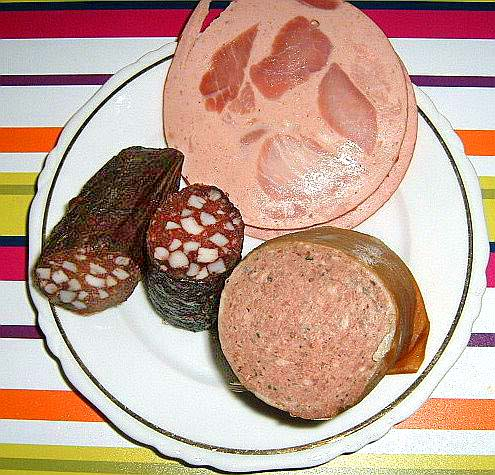 Wurstteller, (Bierschinken, geräucherte Leberwurst und Blutwurst)